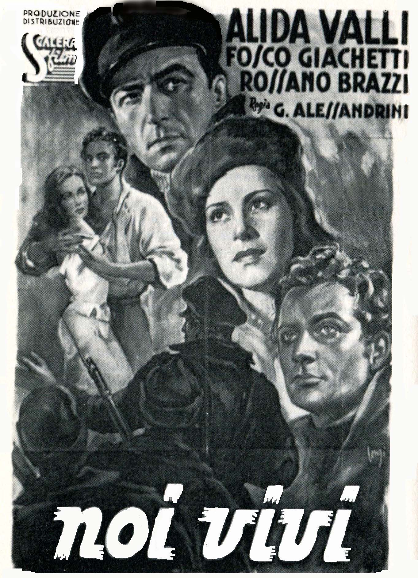 La promozione del film di Alessandrini sulla stampa dell'epoca